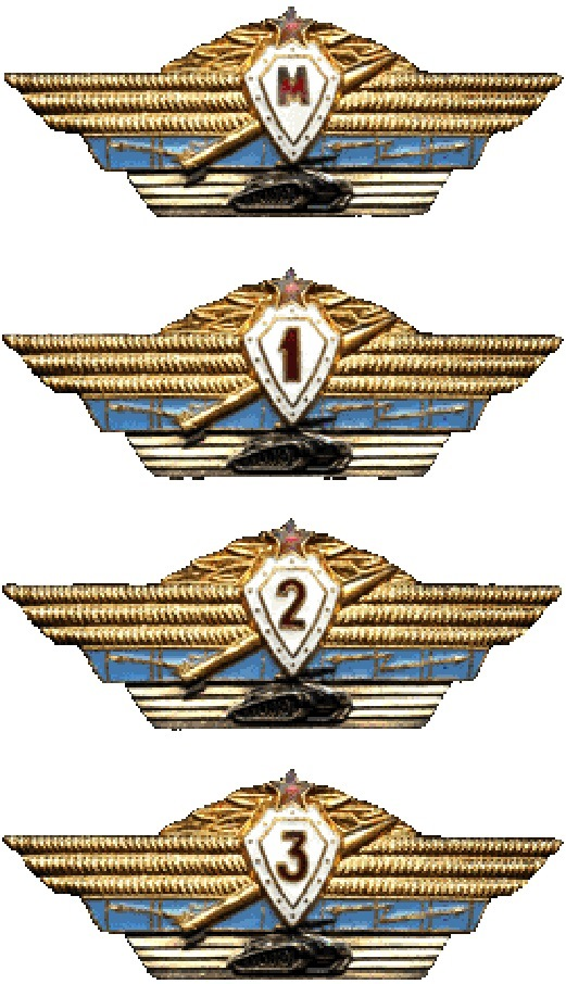 Знаки специалистов командного состава образца 1961года